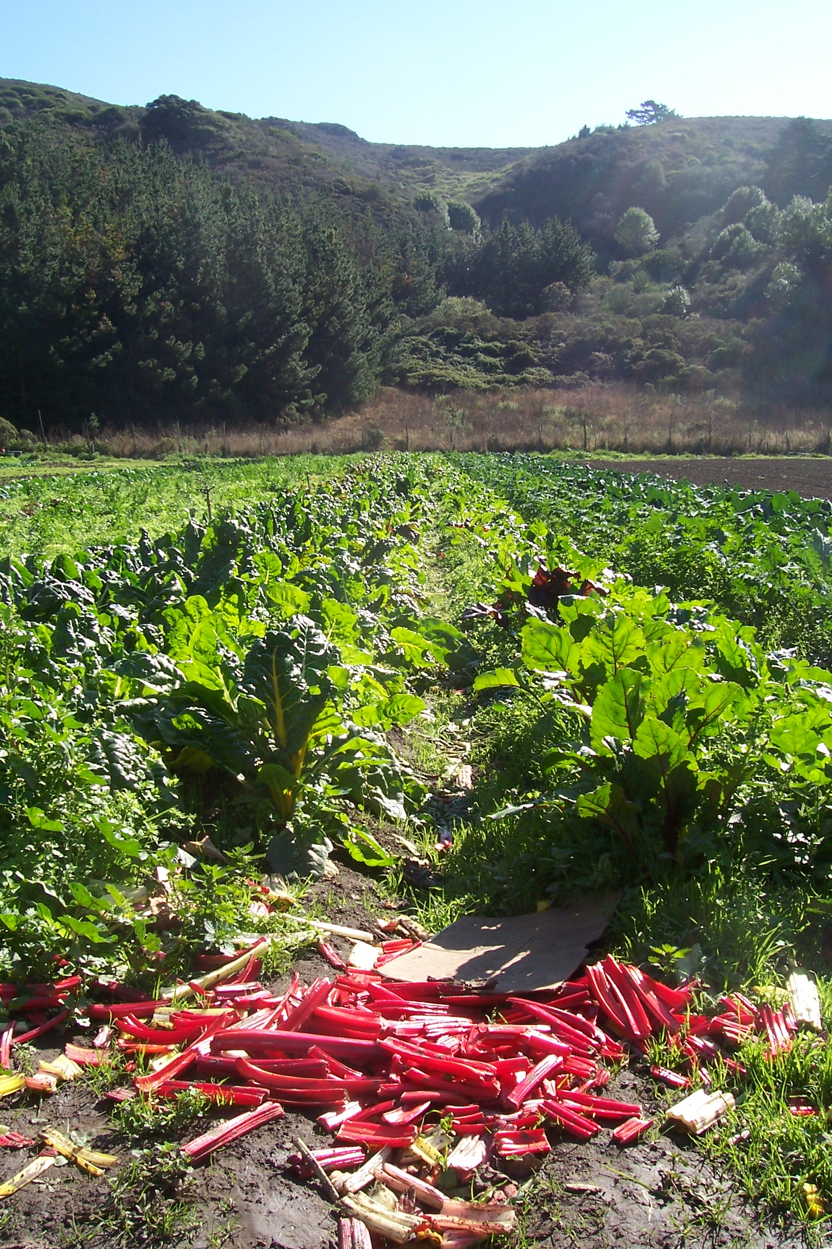 Rheum rhabarbarum - Rhubarb